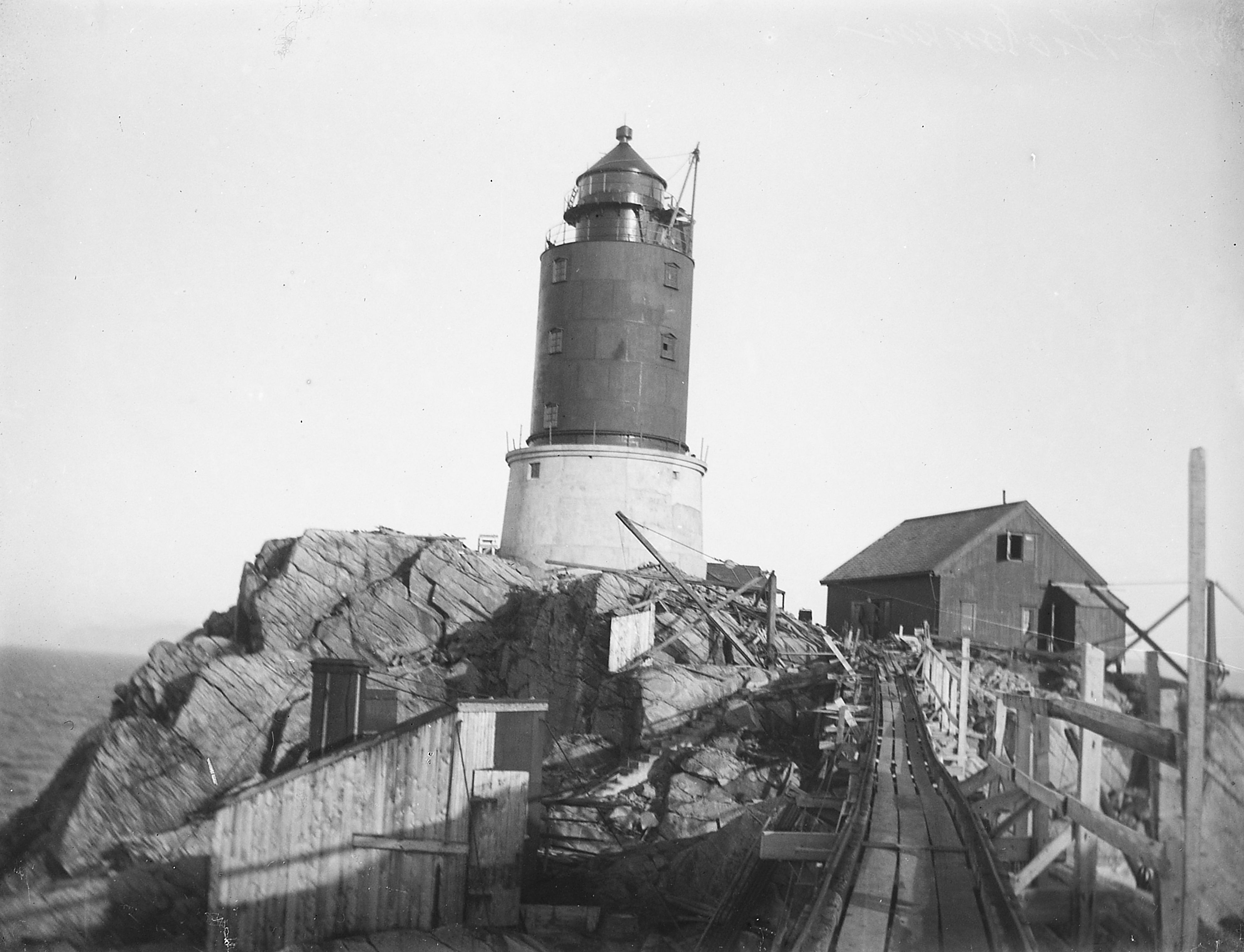 Bildet er hentet fra Arkivverket. Storholmen, Giske Arkivinstitusjon : Riksarkivet Arkivnavn : Fyrdirektoratet Sted : Norge, Møre og Romsdal, Giske, Storholmen Emneord: Fyr, Kyst Avbildet